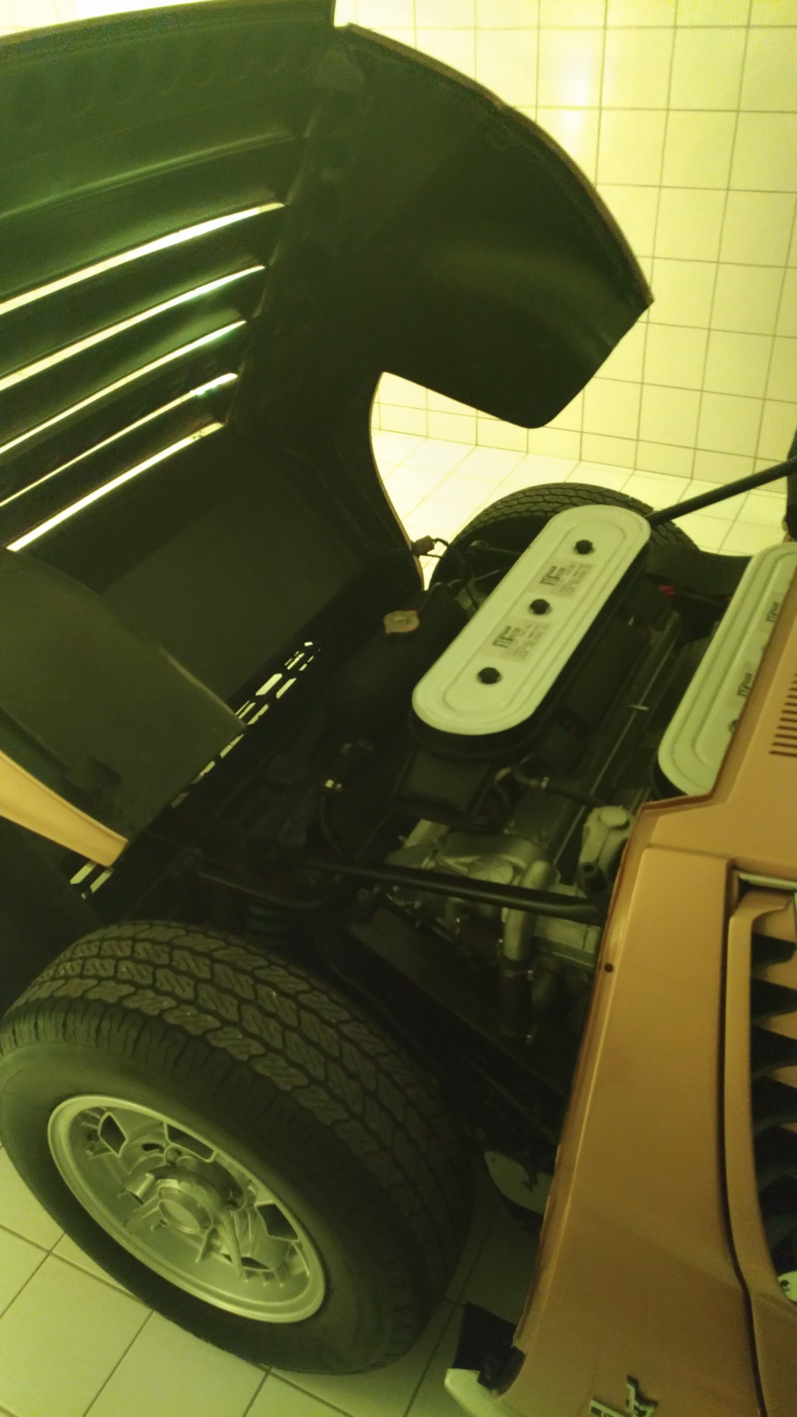 Lamborghini Miura - Soirée inaugurale concession Lamborghini Groupe Schumacher